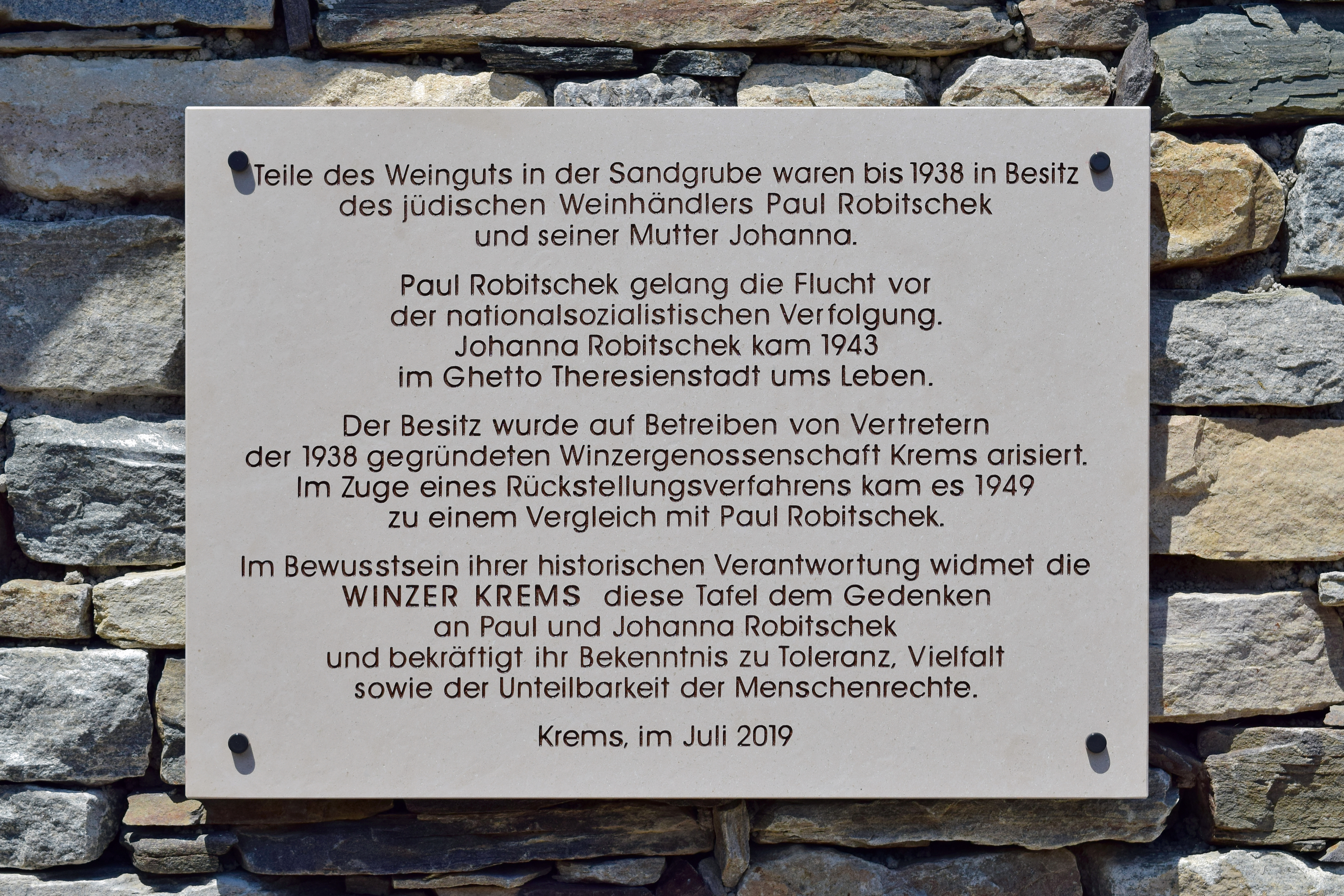 Im Juli 2019 angebrachte Gedenktafel für Paul und Johanna Robitschek an der Hiata-Hütte der Winzer Krems|Winzer Krems Sandgrube 13. Die Keller der Sandgrube 13 wurden 1938 arisiert.